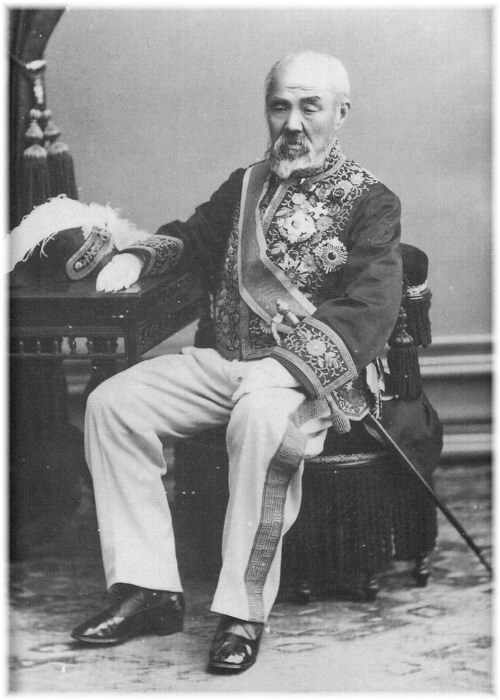 山階宮晃親王